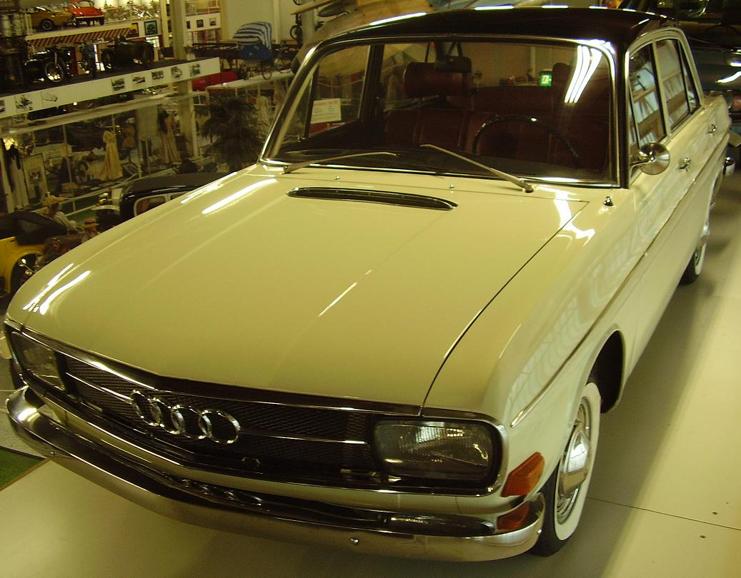 Audi F103 at the Sinsheim Auto & Technik Museum (Sinsheim / Germany)